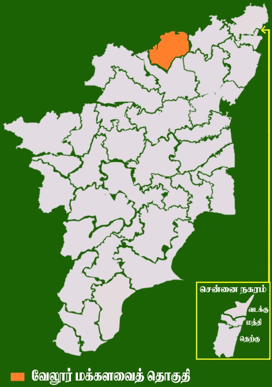 தமிழக வரைபடத்தில் உள்ள வேலூர் மக்களவைத் தொகுதி